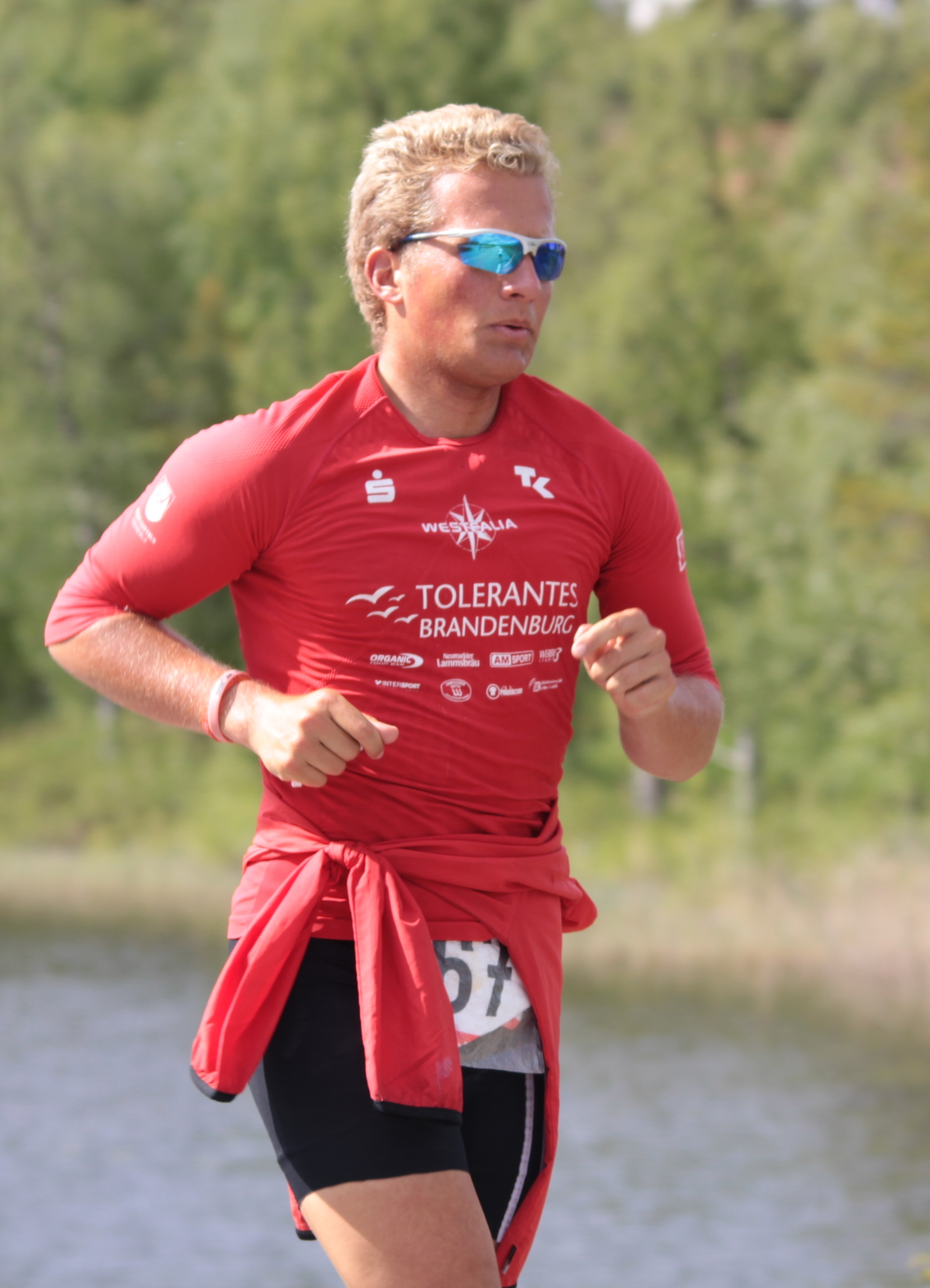 Marcel Heinig in Schweden beim Europalauf 2009.